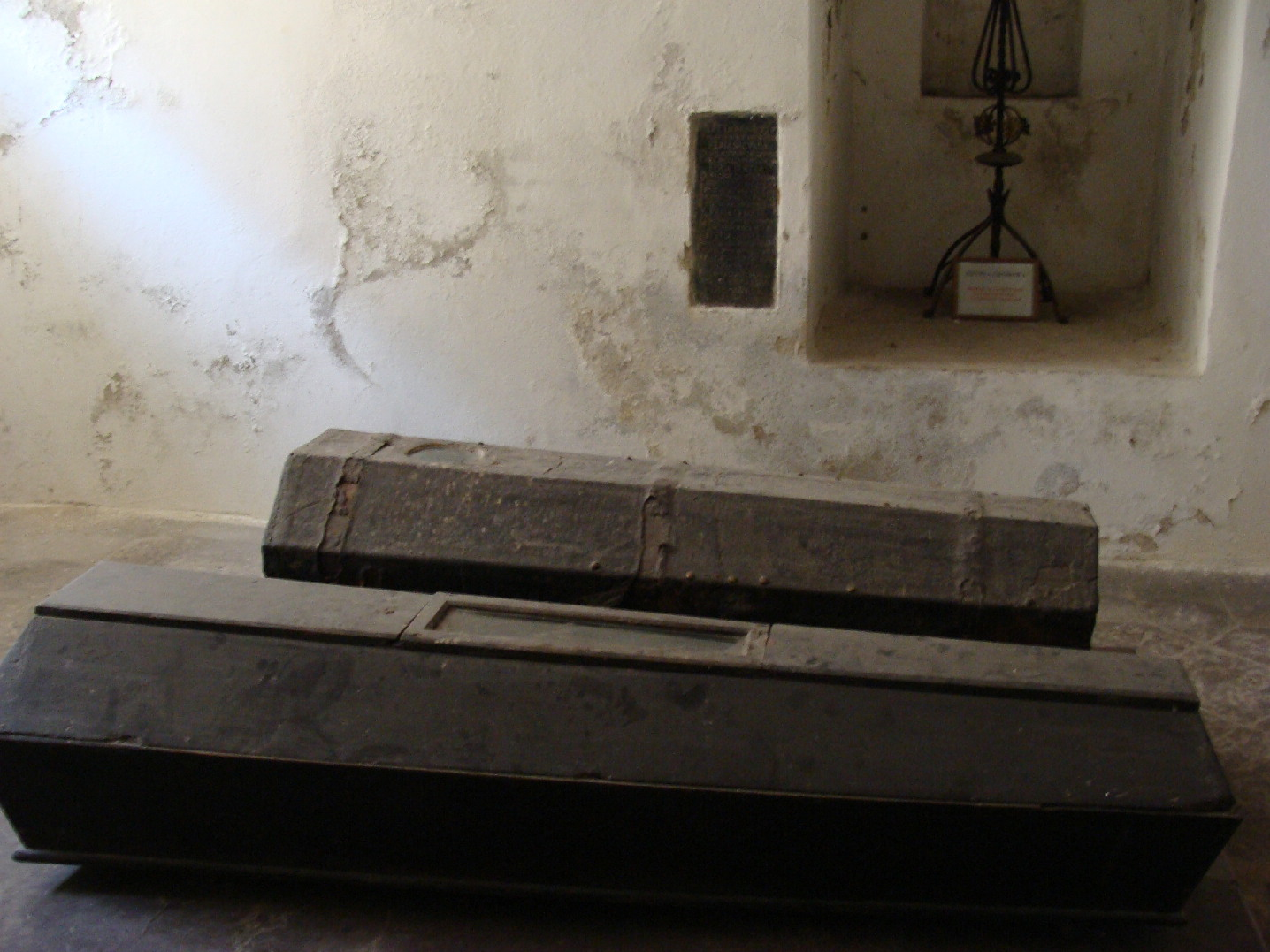 Kaplica nagrobna Oświęcimów. Fundowana w 1647 przez Stanisława Oświęcima. Projekt architekta W. Petroniego i J.Ch. Falconiego. Pod kaplicą krypta Stanisława i Anny rodzeństwa Oświęcimów.